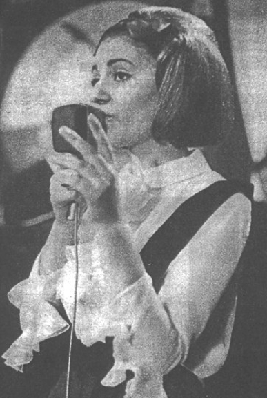 Mia Martini al Festival di Bellaria del 1964; foto tratta dalla rivista "Eva" del 23 maggio 1964